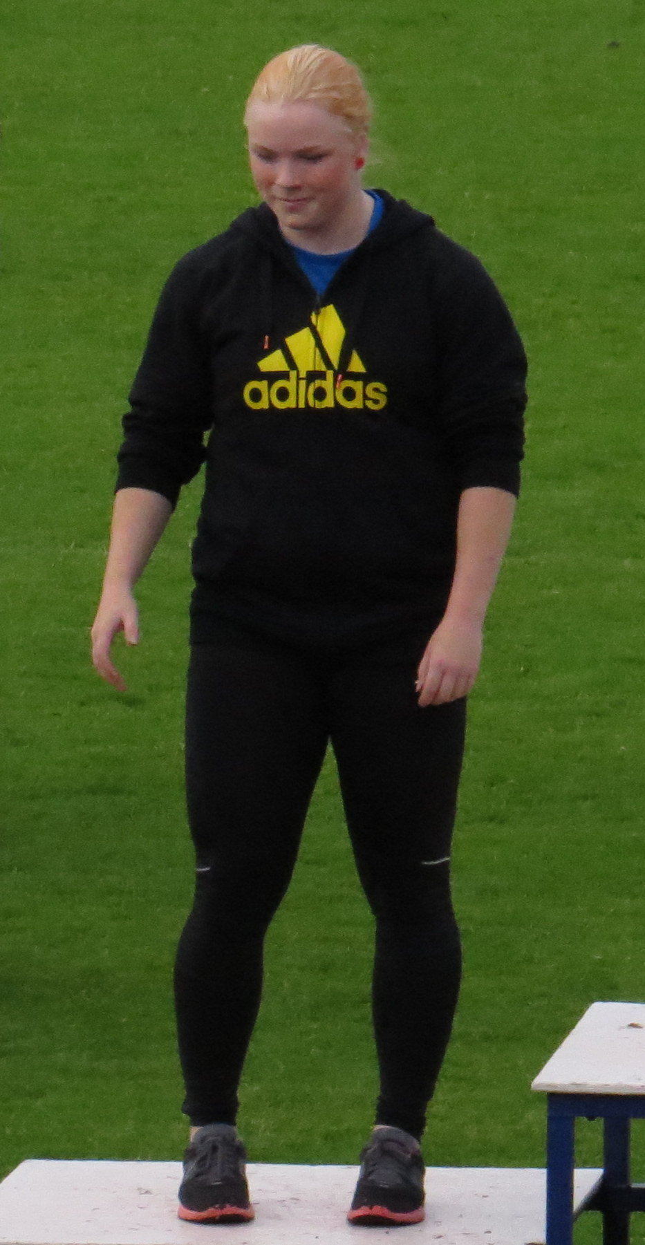 Krista Tervo, suomalainen moukarinheittäjä, vuonna 2015.